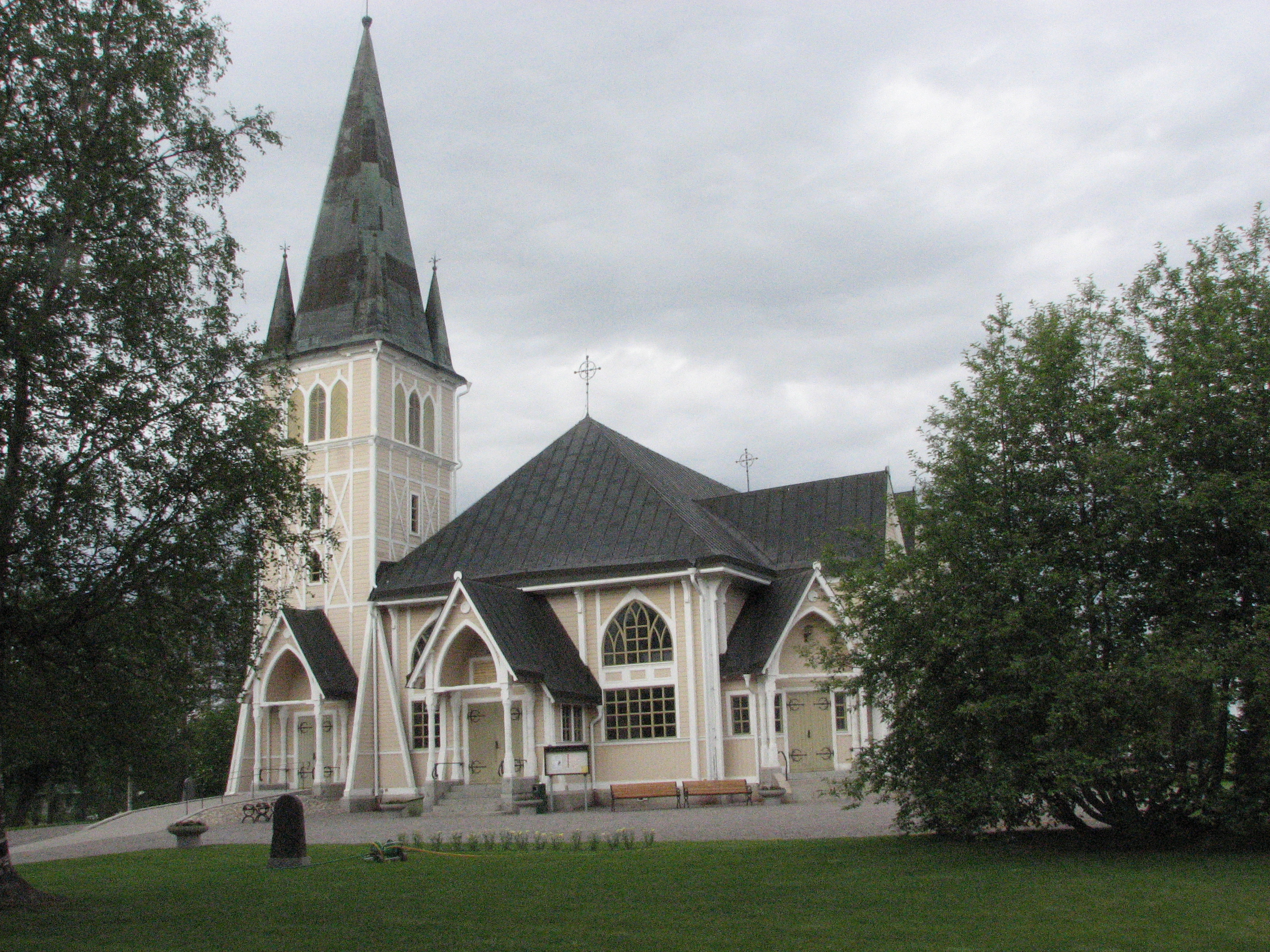 Arvidsjaur church, Arvidsjaur, Sweden. Year 2011